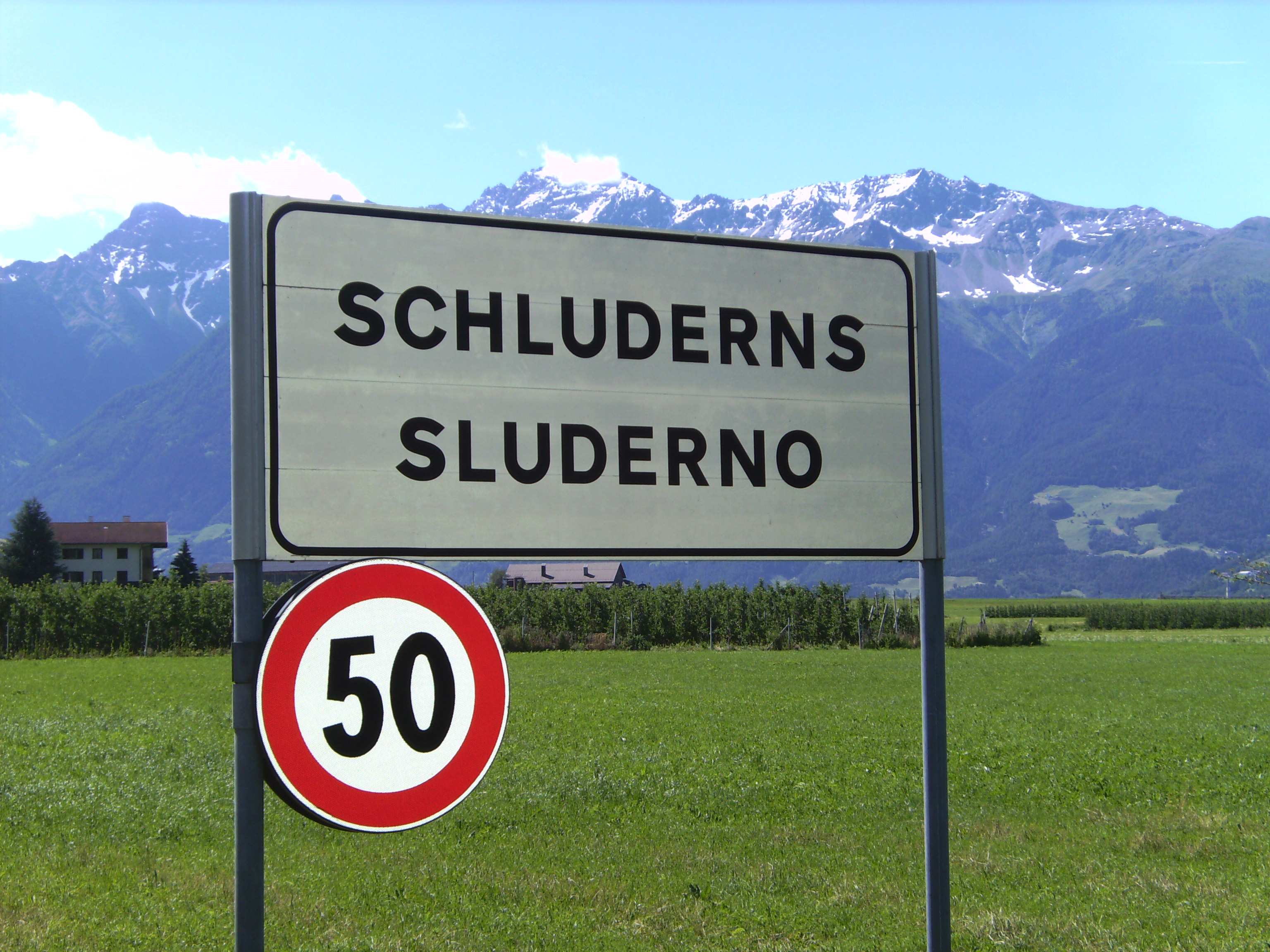 Ortsschild von Schluderns in Südtirol